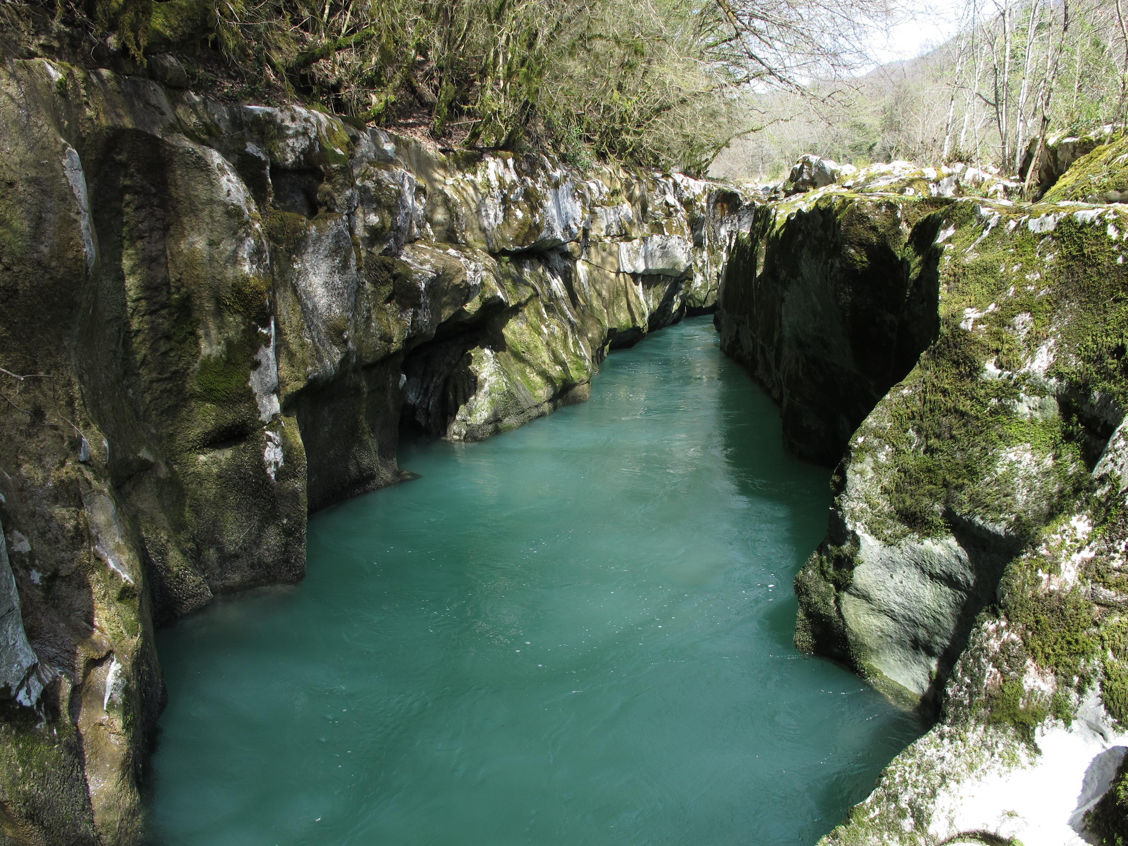 Les pertes de la Valserine proche de Bellegarde.